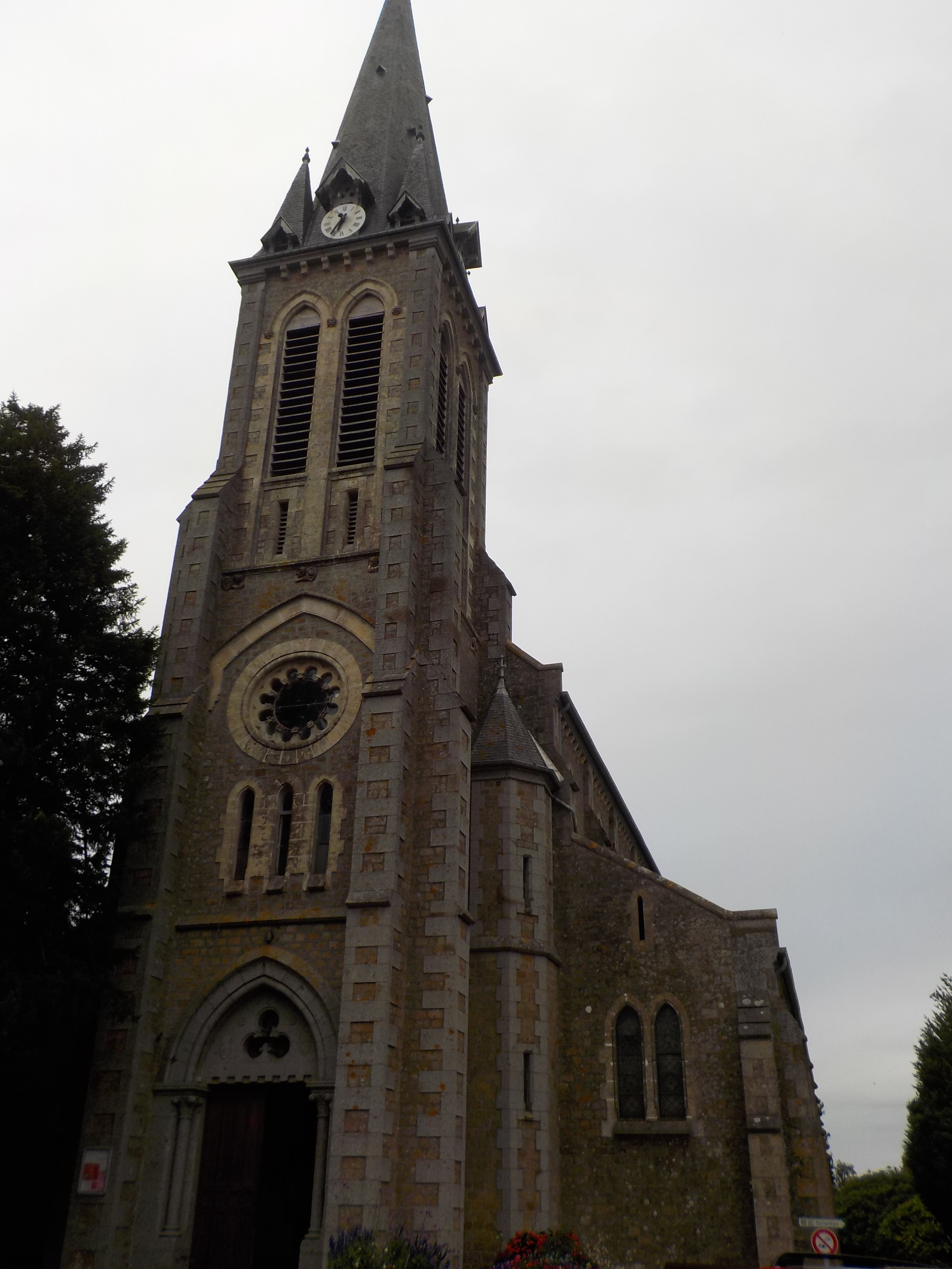 Eglise Notre dame de l'Assomption, la Lande Patry